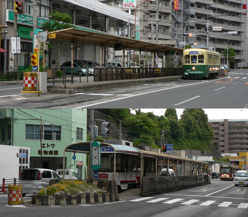 長崎電気軌道、赤迫電停